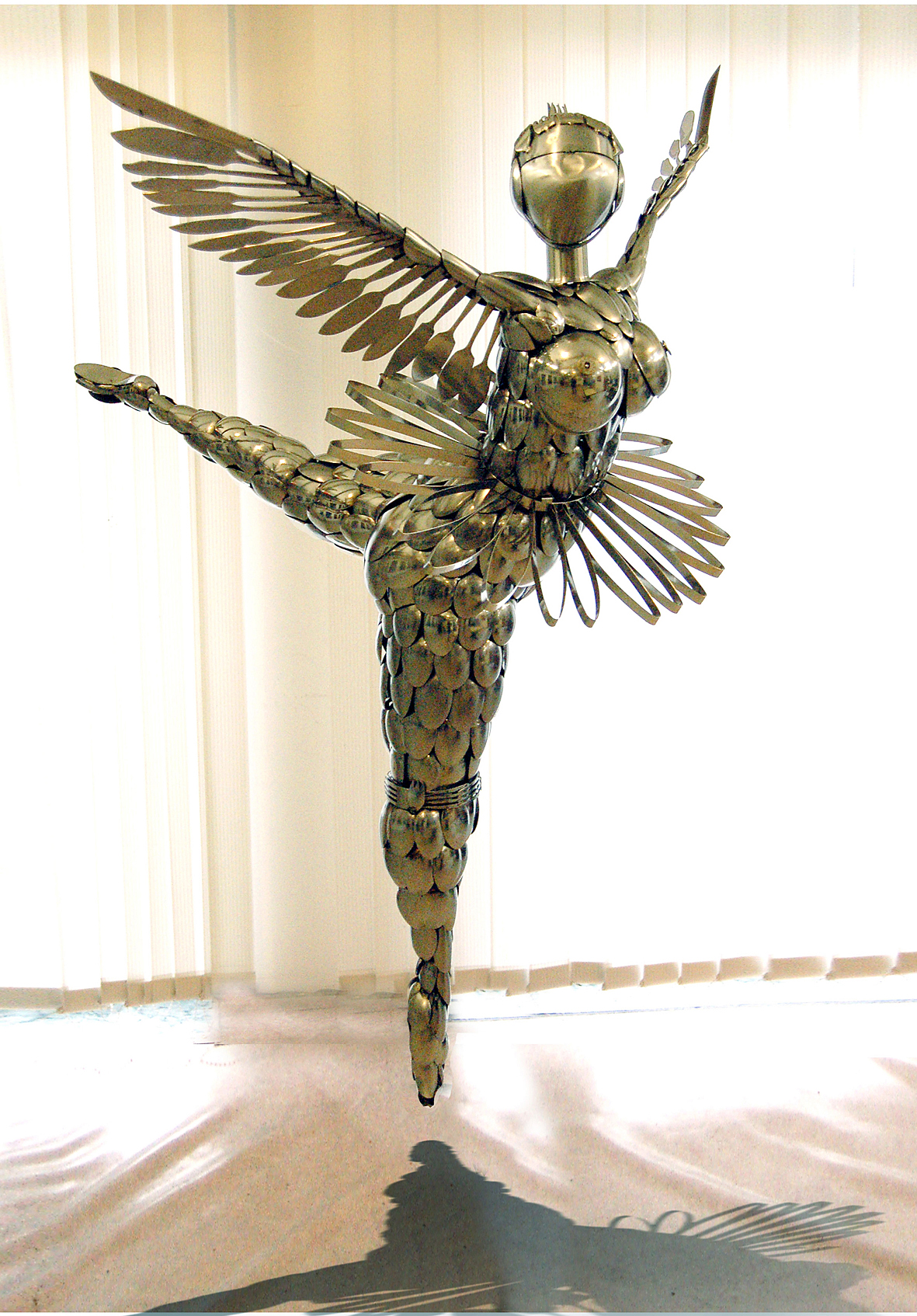 Alexander Göttmann, Tagträumerin, 2020